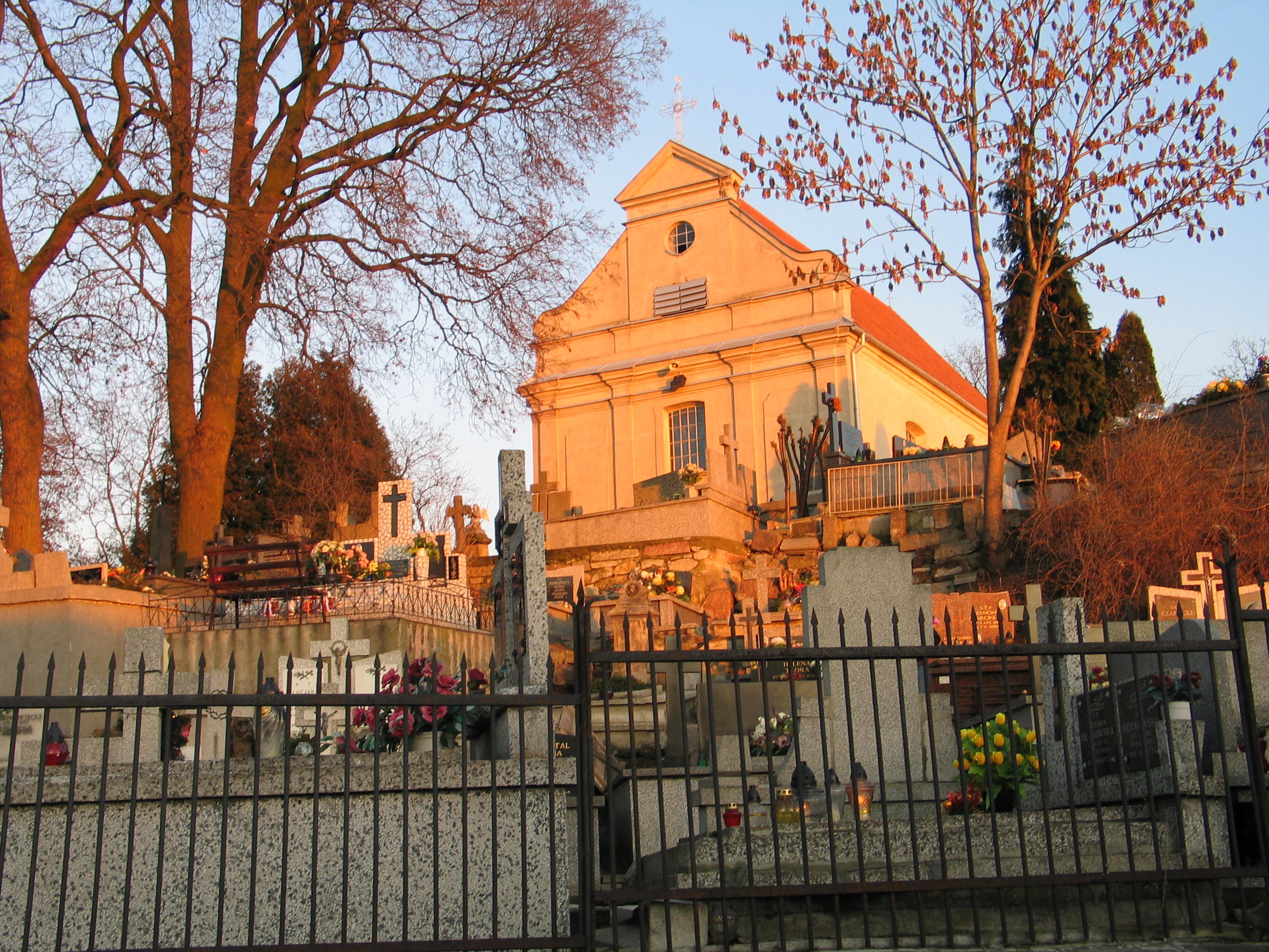 Kosciół pod wezwaniem Świętego Wawrzyńca z 1786 roku, późnobarokowy z klasycyzującą elewacją, na wzgórzu cmentarza grzebalnego w Mławie. Widok ogólny.